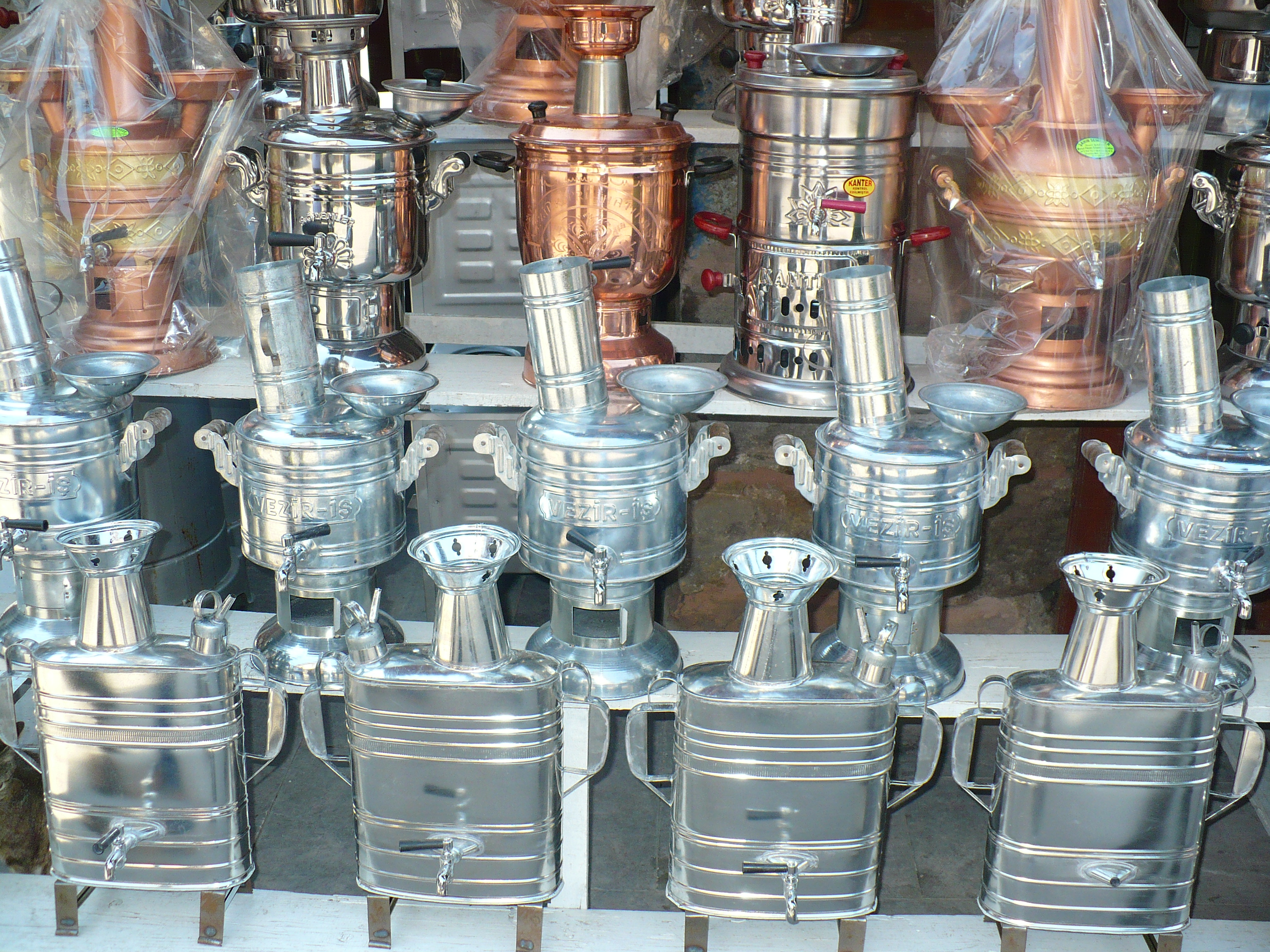 Teneke semaverler